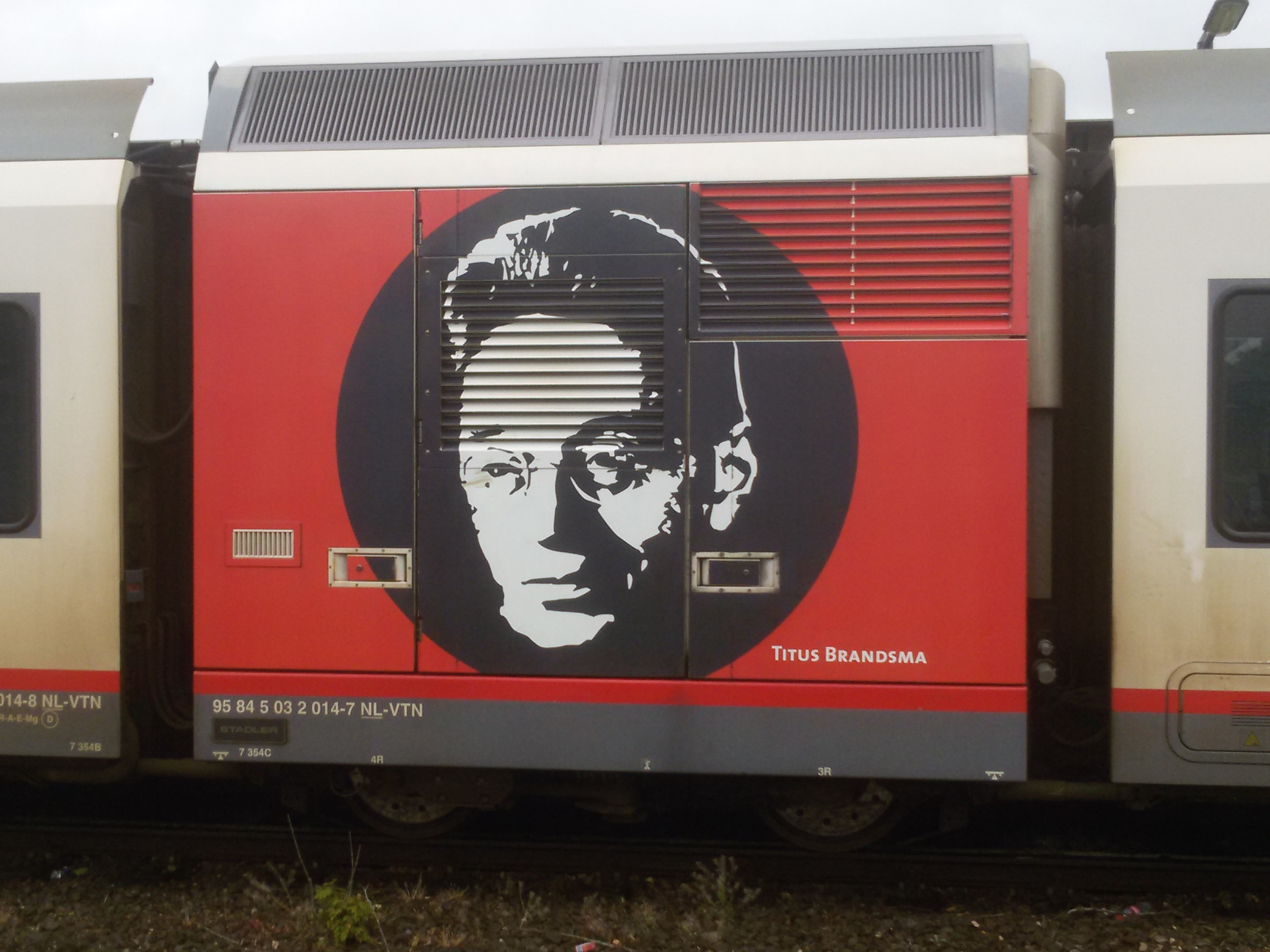 Titus Brandsma